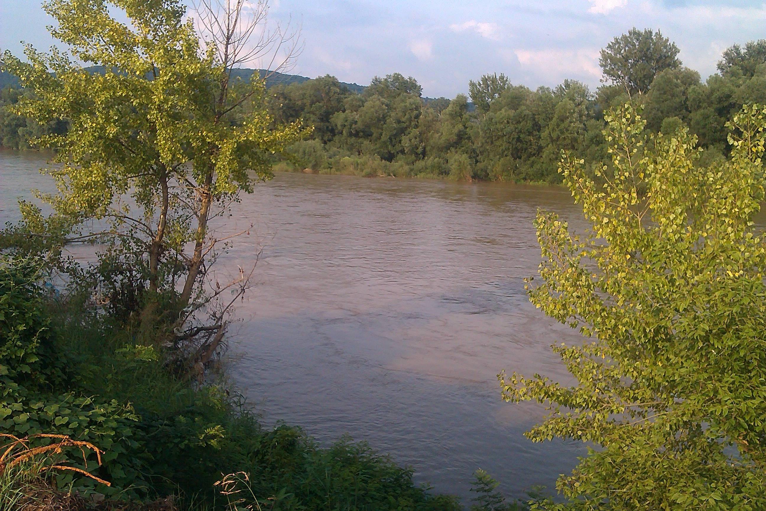 Srpski (latinica): Reka Velika Morava kod Bagrdana